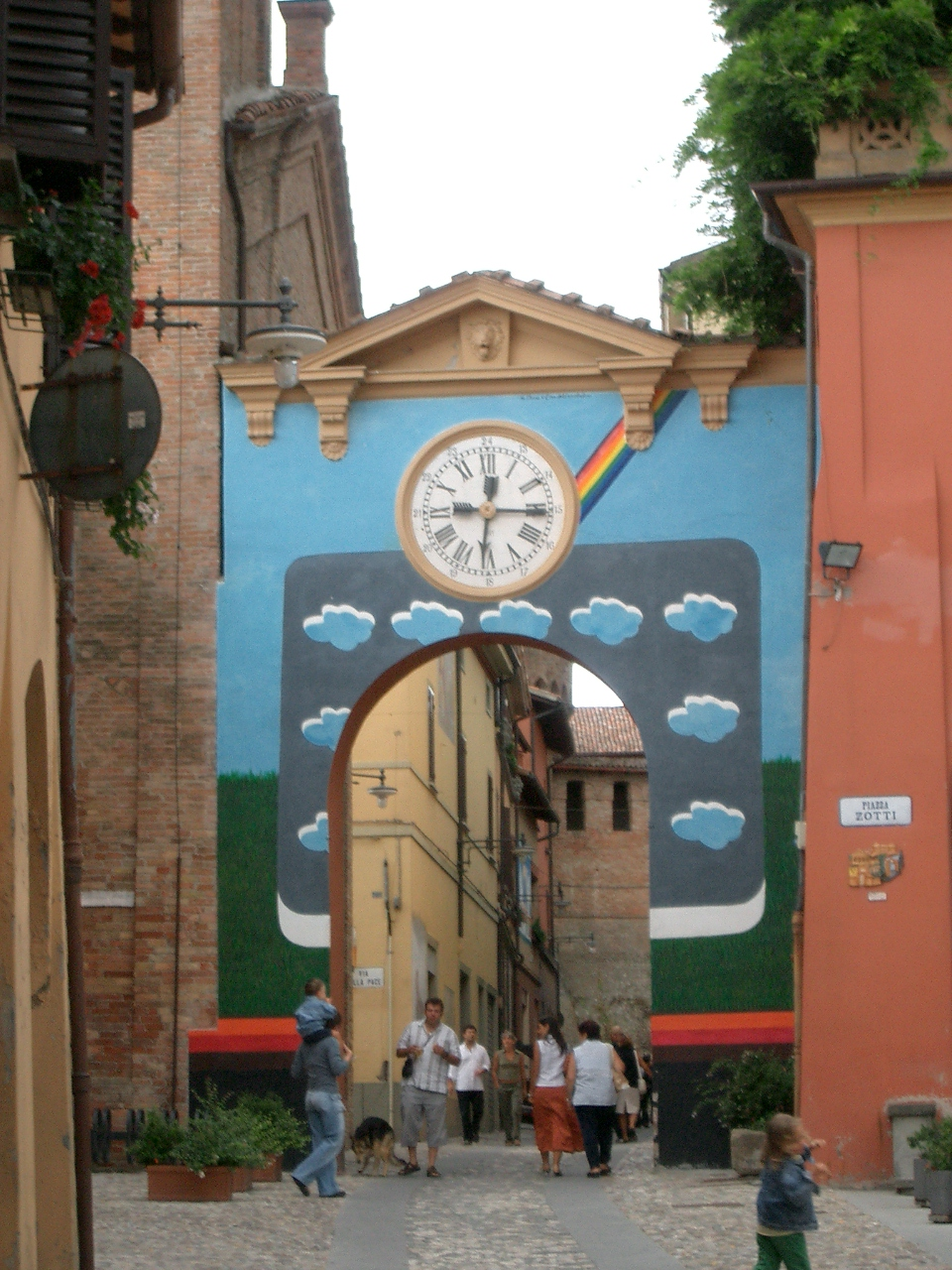 eigen werk Ruben Alexander